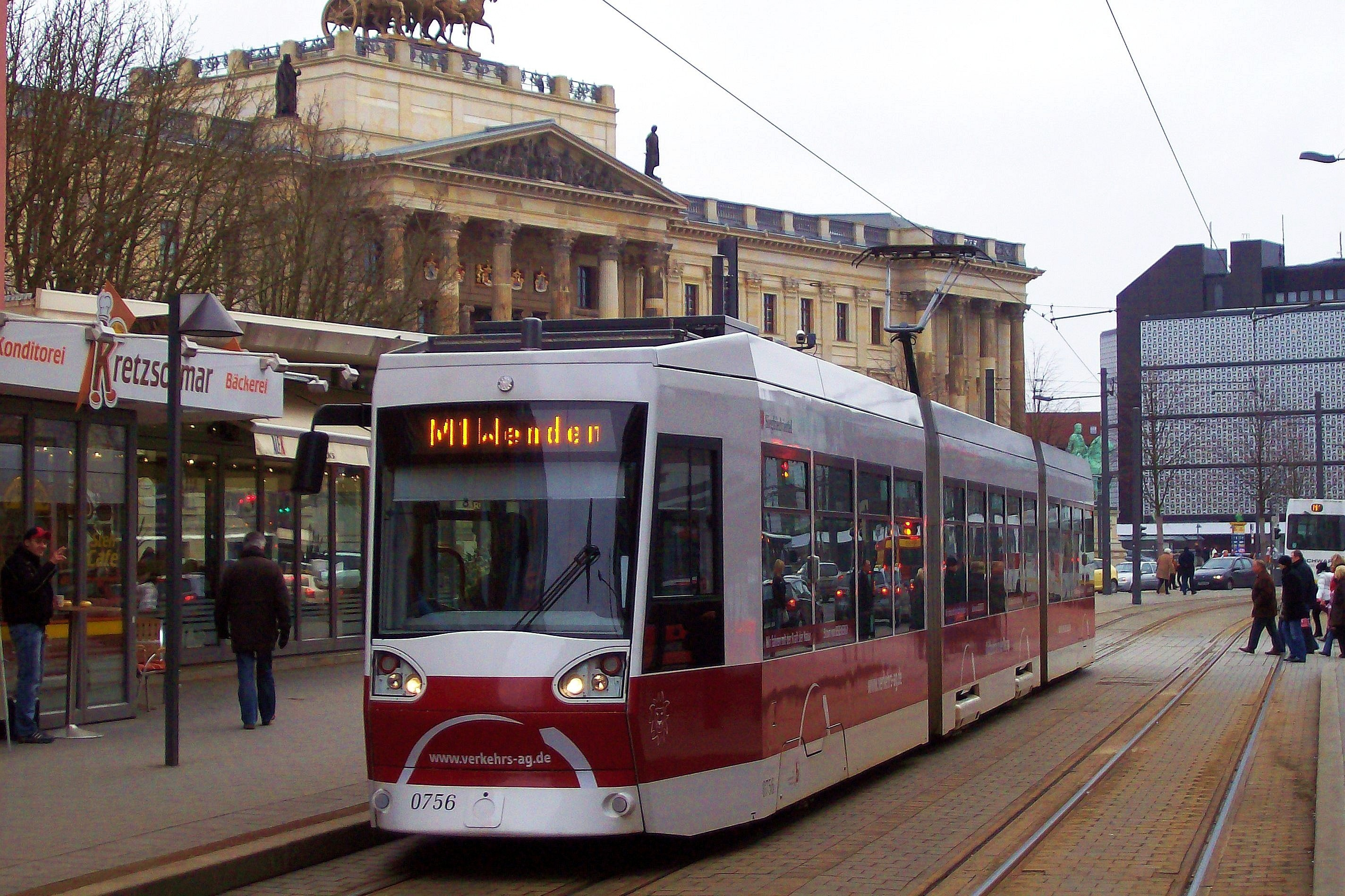 Braunschweiger Verkehrs-AG: 0756 (Alstom NGT8D) auf dem Bohlweg